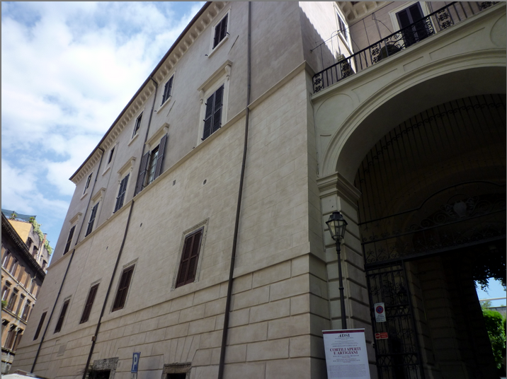 Palazzo Taverna degli Orsini a Monte Giordano